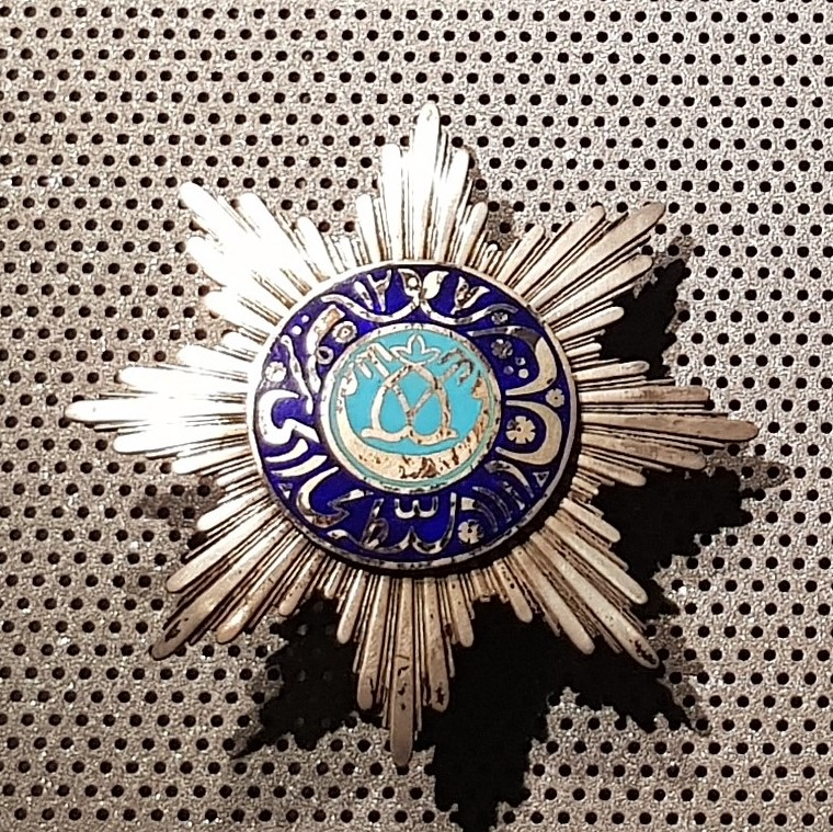 Order Gwiazdy Wschodzącej (Buchara / Imperium Rosyjskie)